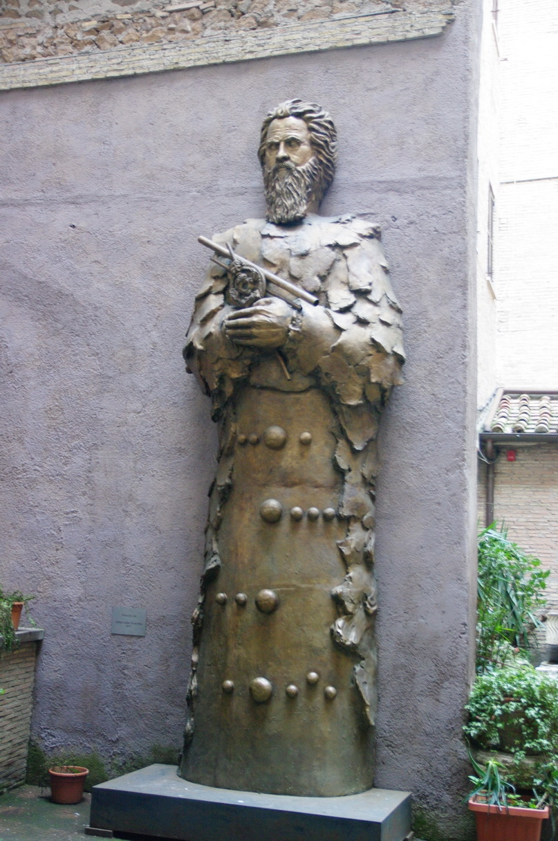 Galilei, Santa Maria degli Angeli